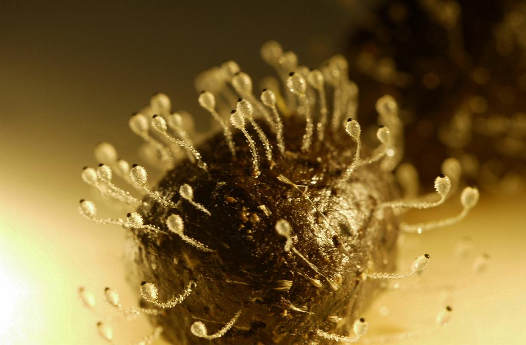 Pilobolus crystallinus：ミズタマカビ 2011/12/17 和歌山県南部・シカの糞から